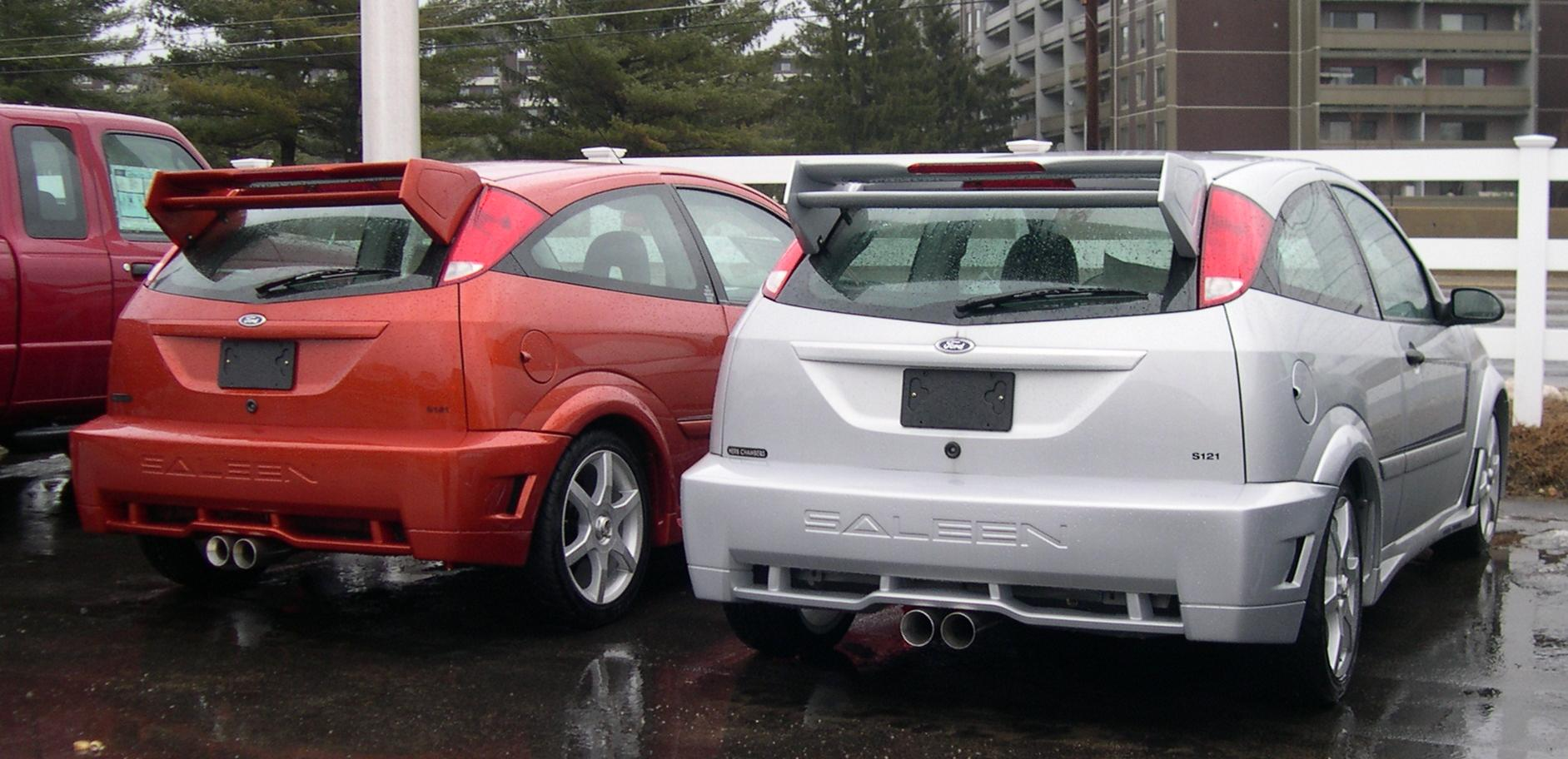 2006 Saleen S121 Ford Focuses